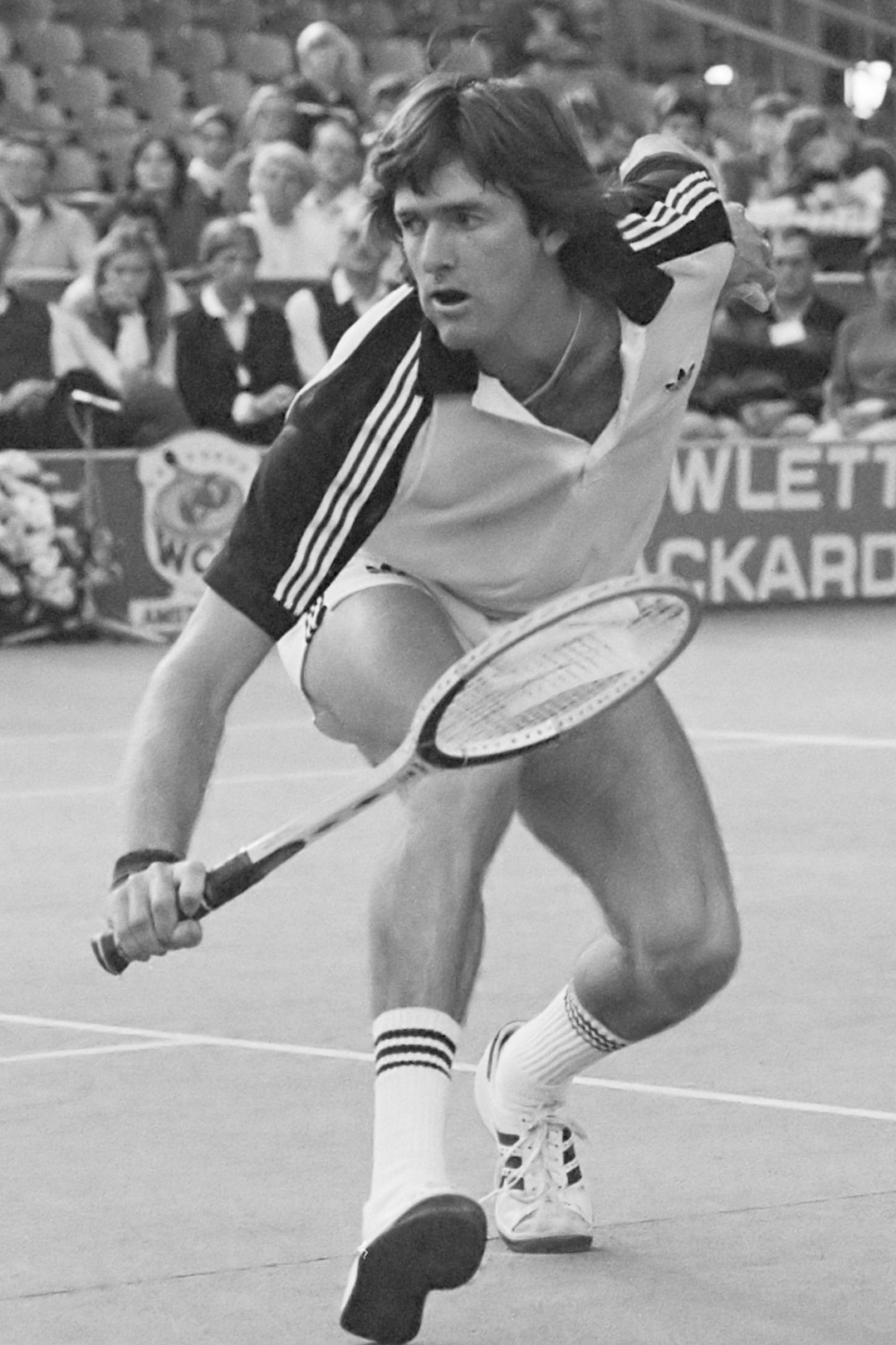 Finale van het WCT-tennistoernooi. Zuidafrikaan Curren in actie 27 oktober 1982